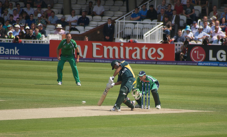 Ireland vs Pakistan